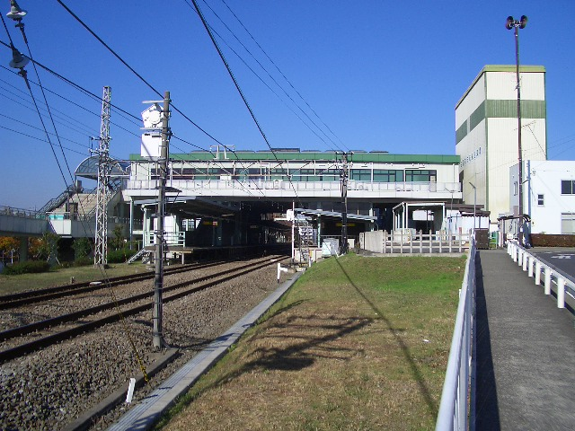 Mutsuai-Nichidaimae Station, on the Odakyu Enoshima Line, Fujisawa, Kanagawa 六会日大前駅